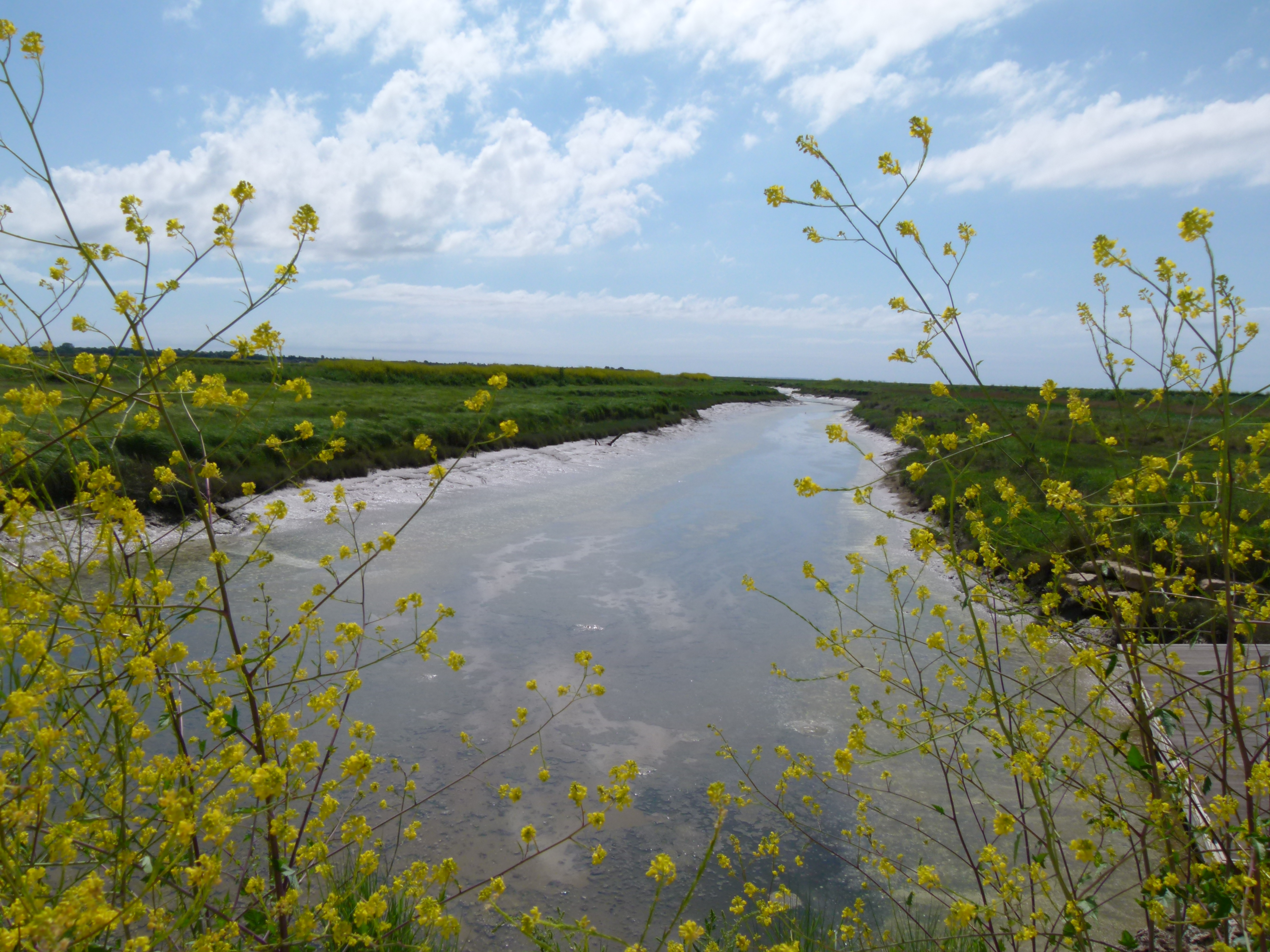 Le canal du Curé à marée basse avant son embouchure (commune de Charron - 17)